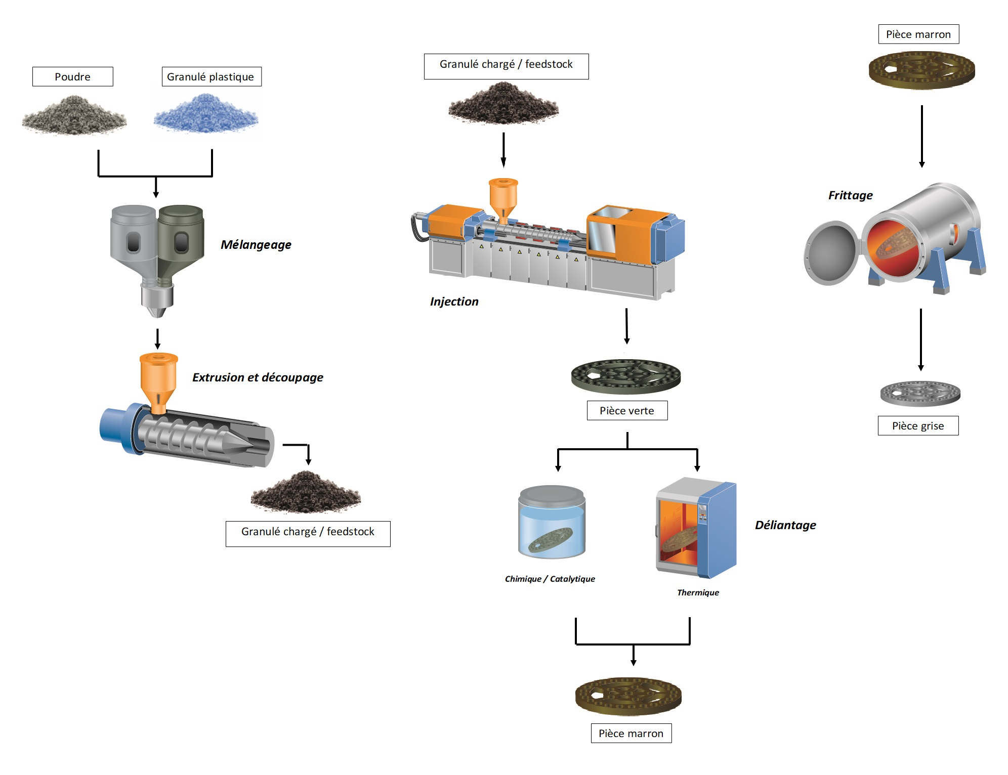 Cet image représente les différentes étapes du procédés de moulage par injection de poudre. On peut y voir les quatre différentes parties qui sont la création de granulé chargé, le moulage, le déliantage et le frittage.